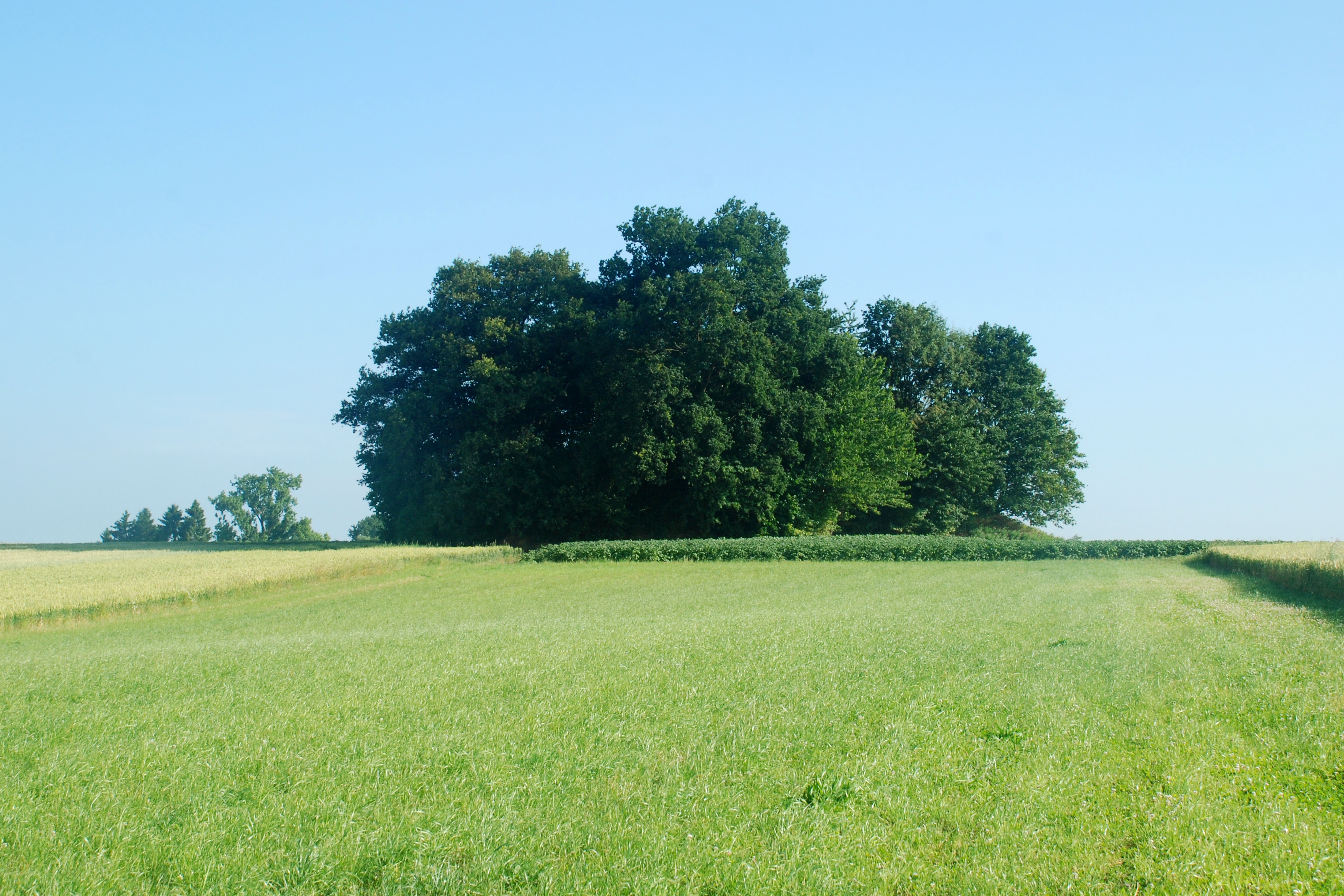 Belgique - Brabant wallon - Chastre - Cortil-Noirmont - Tumuli de Noirmont